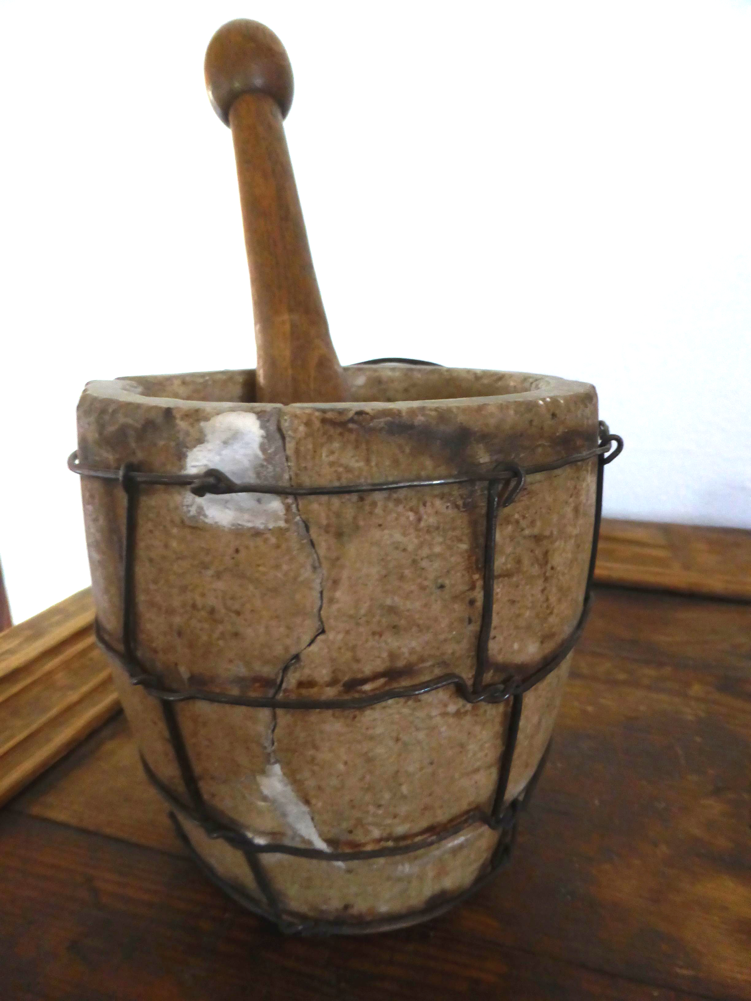 Apotheker-Mörser